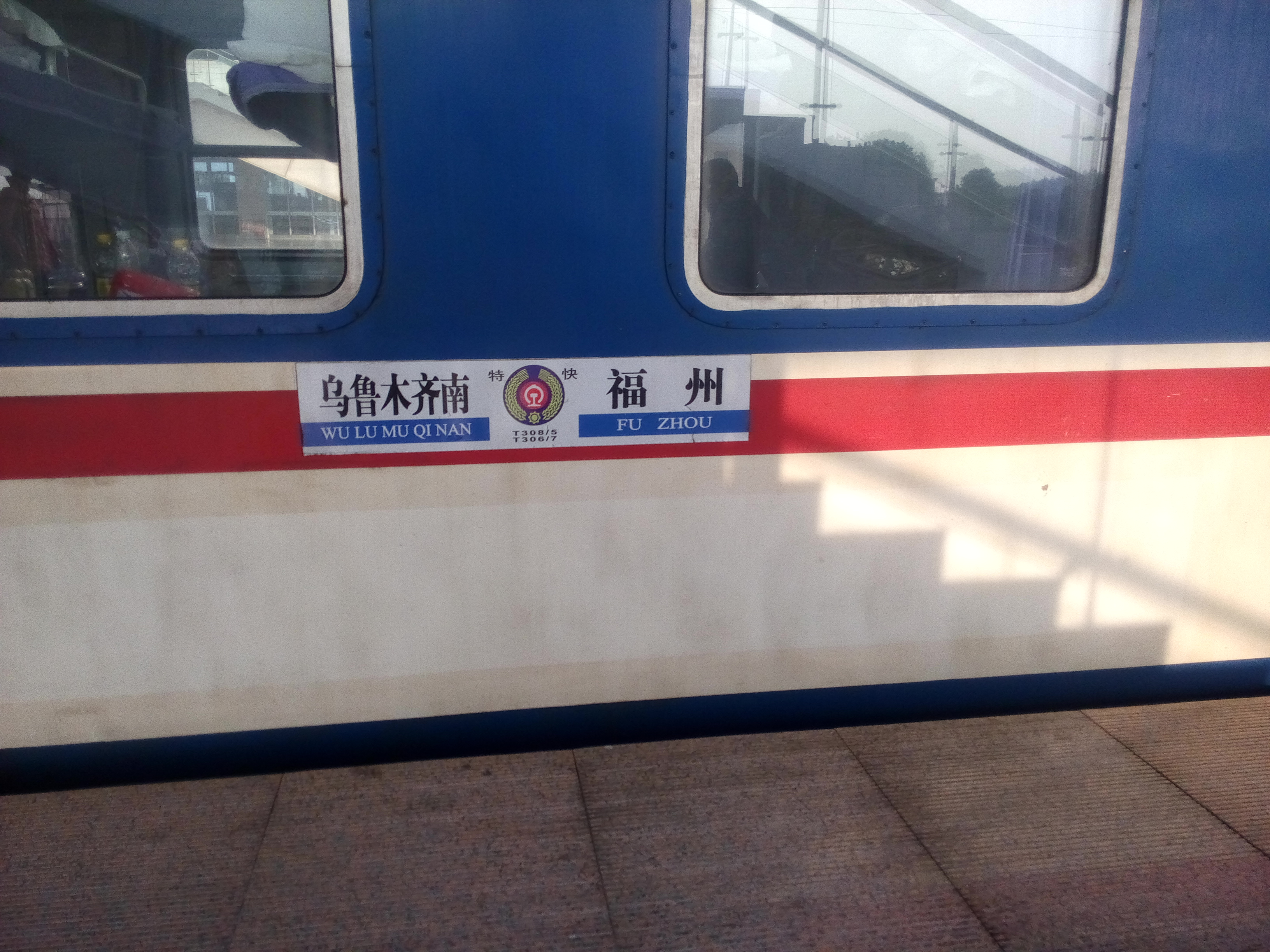 停靠在抚州站4站台的T308/305、T306/307次列车